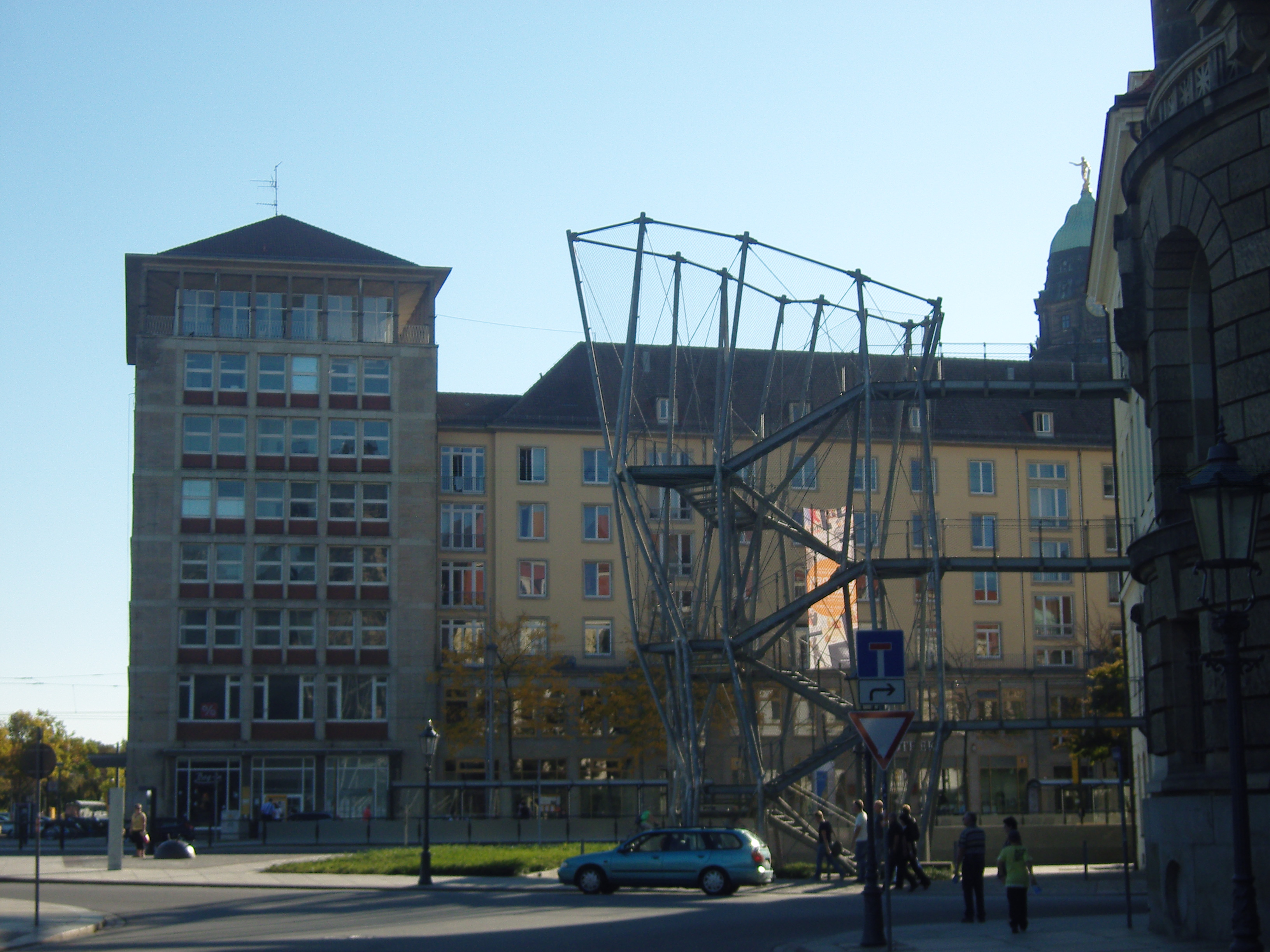 Denkmalgeschütztes Wohnhaus in der Wilsdruffer Straße 3 in Dresden